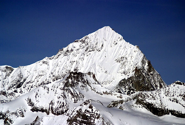 Dent Blanche, im Vordergrund die Porte de Zinal